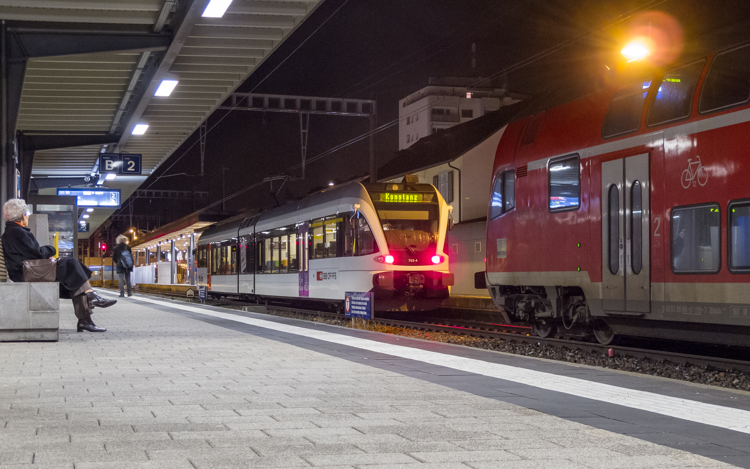 Abend am Gleise 2 im Bahnhof Kreuzlingen